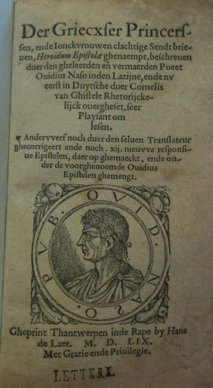 Der Griecxser Princerssen, ende Ionckvrouwen clachtige Sendt brieuen, Heroidum Epistolae genaempt, beschreuen duer den gheleerden ende vermaerden Poeet Ouidius Naso inden Latijne, ende nv eerst in Duytsche duer Cornelis van Ghistele Rhetorijckelijck ouergheset, seer Playsant om lesen. Andervverf noch duer den seluen Translateur ghecorrigeert ende noch . xij. nieuvve responsiue Epistelen, daer op ghemaeckt, ende onder de voorghenoemde Ouidius Epistelen ghemengt. Vignet: PVB. OVID. NASO. Gheprint Thantwerpen inde Rape by Hans de Laet. M. D. LIX. Met Gratie ende Priuilegie.